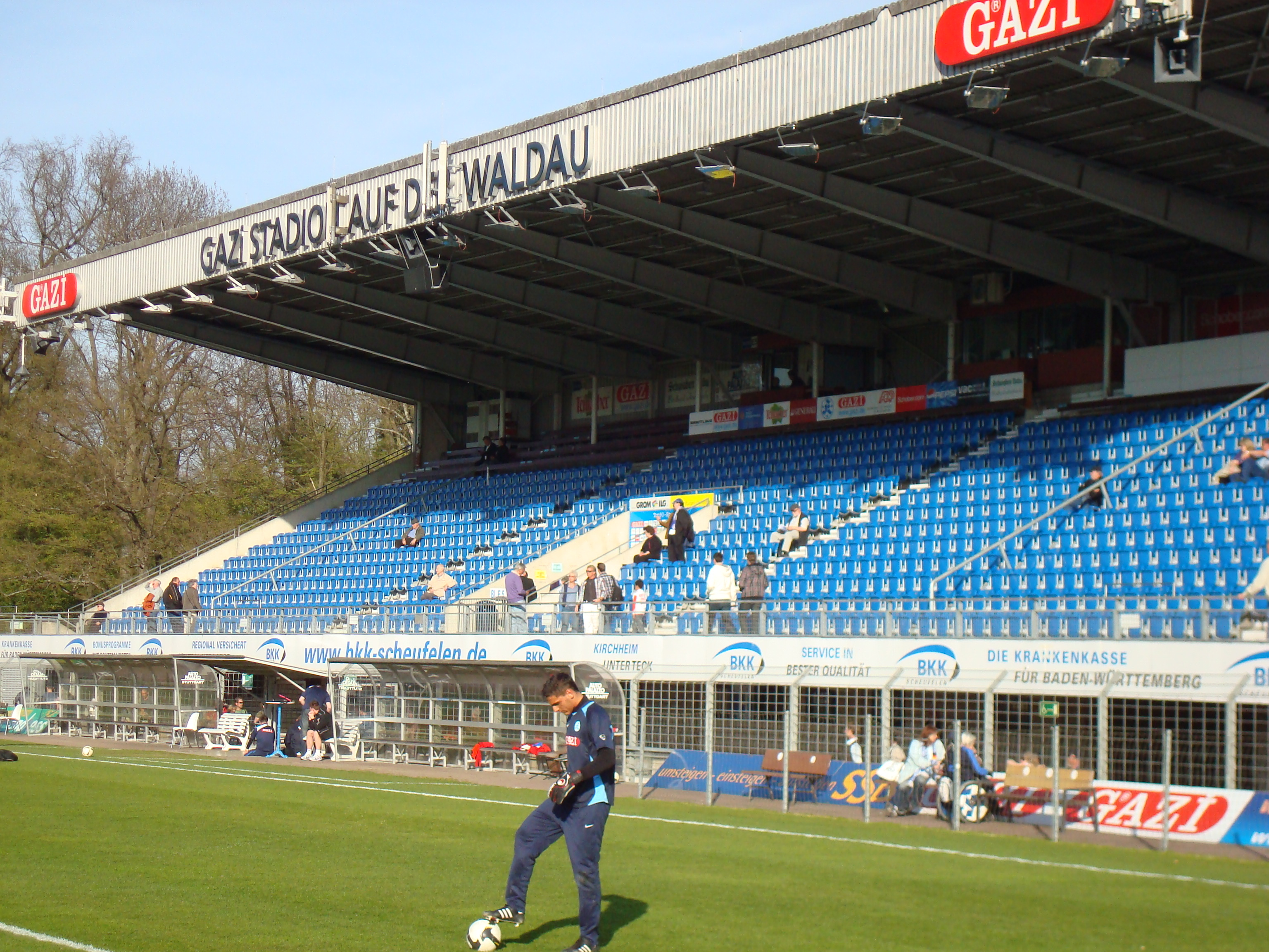 Die Haupttribüne im Gazi-Stadion auf der Waldau mit Sitzschalen 2010